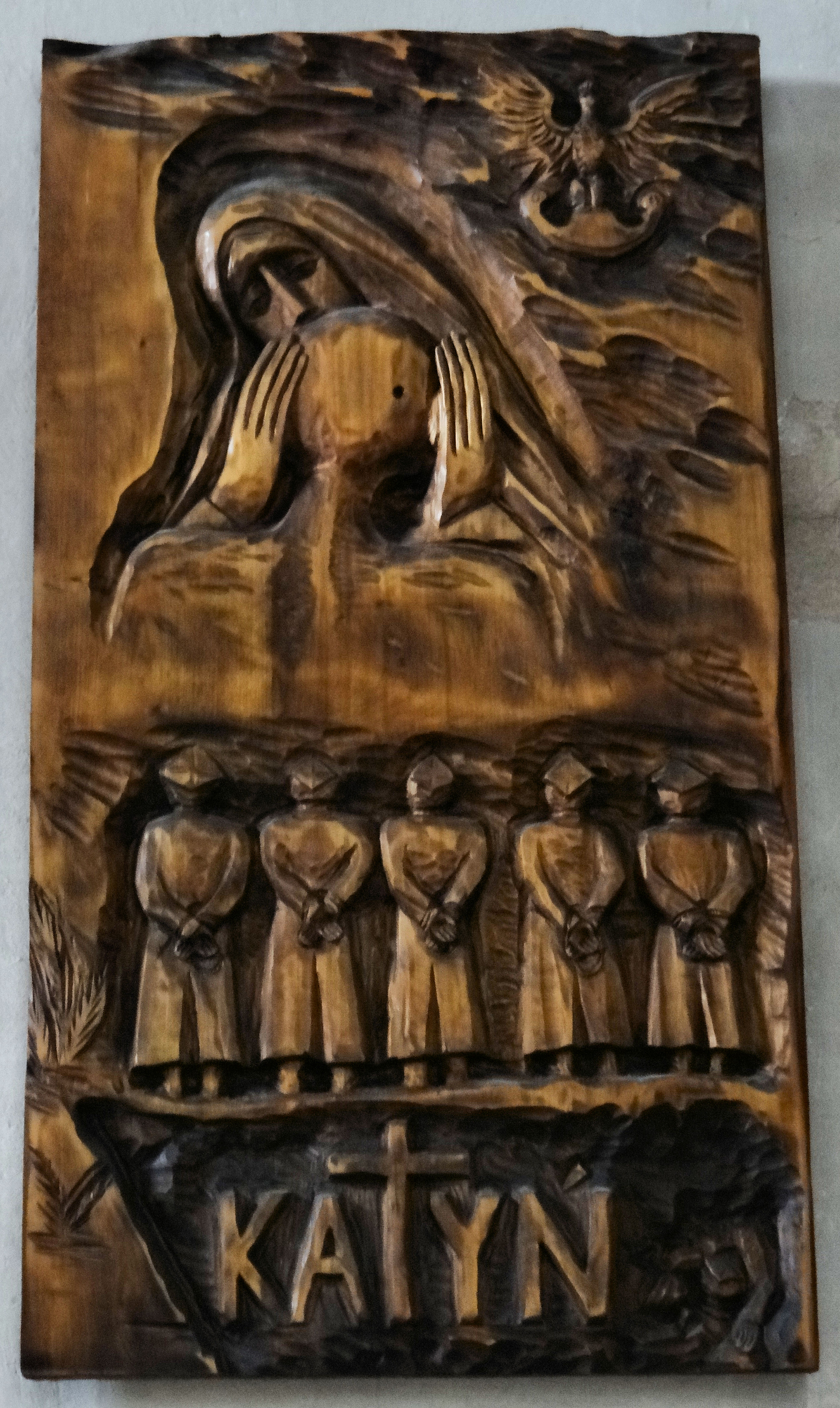 Kościół Klasztorny Pijarów w Łowiczu - Katyń - tablica pamięci